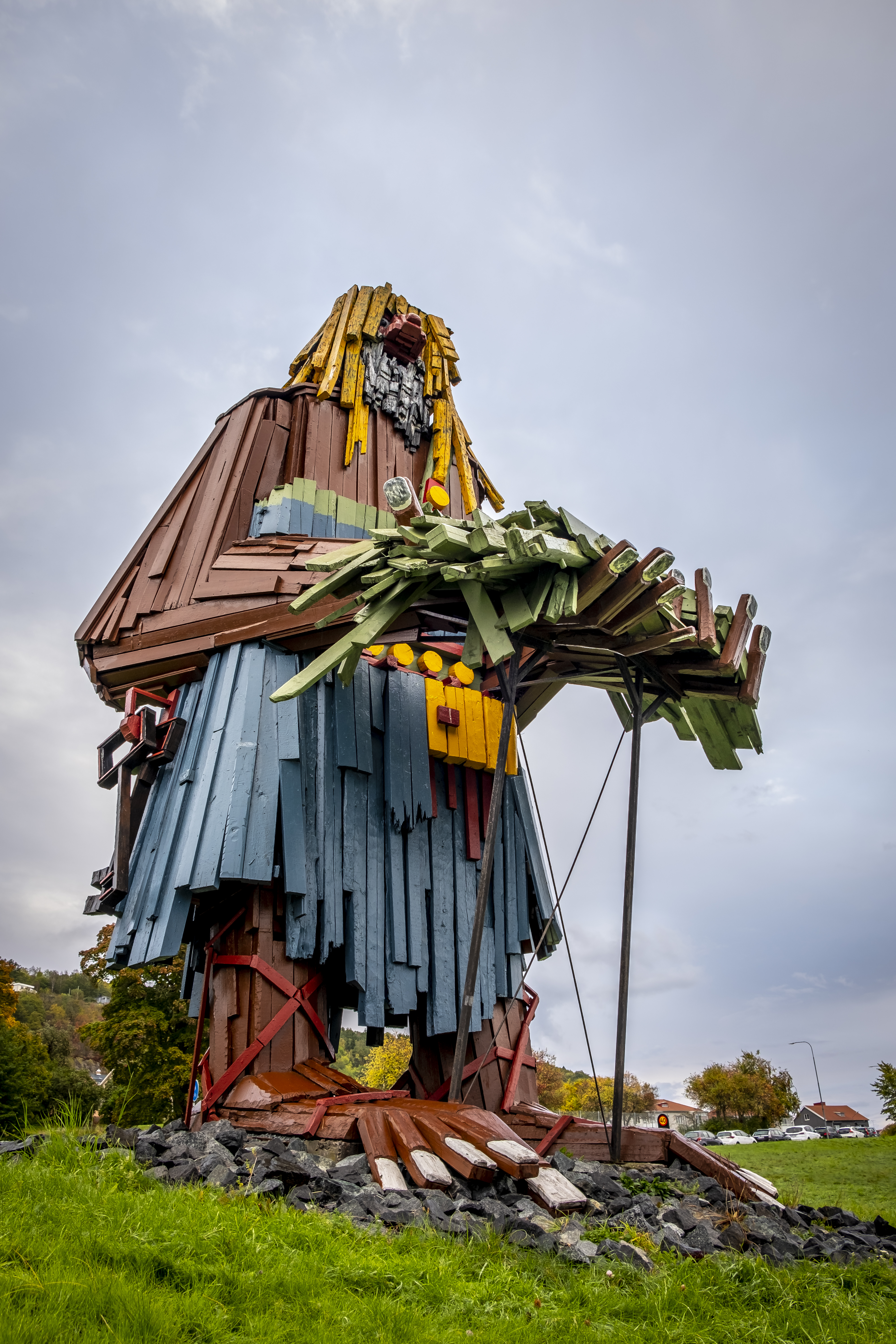 Jätten Vist, träskulptur av Calle Örnemark.